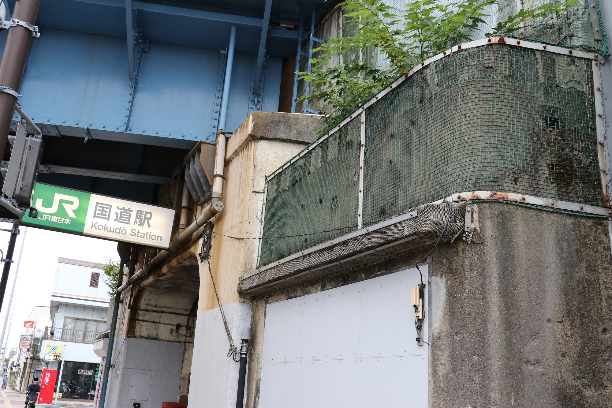 国道駅の銃撃跡